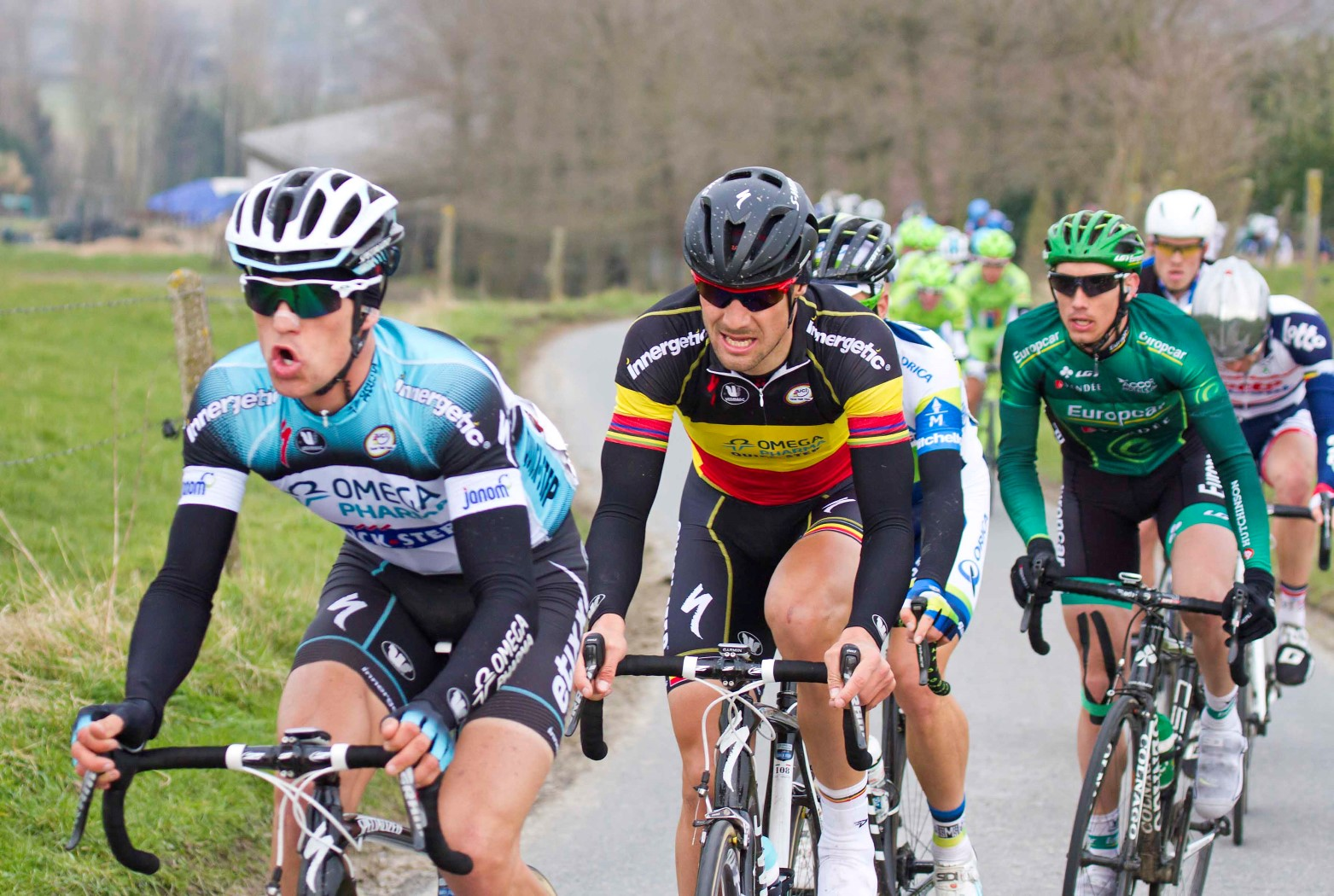 014 stybar boonen kapelberg